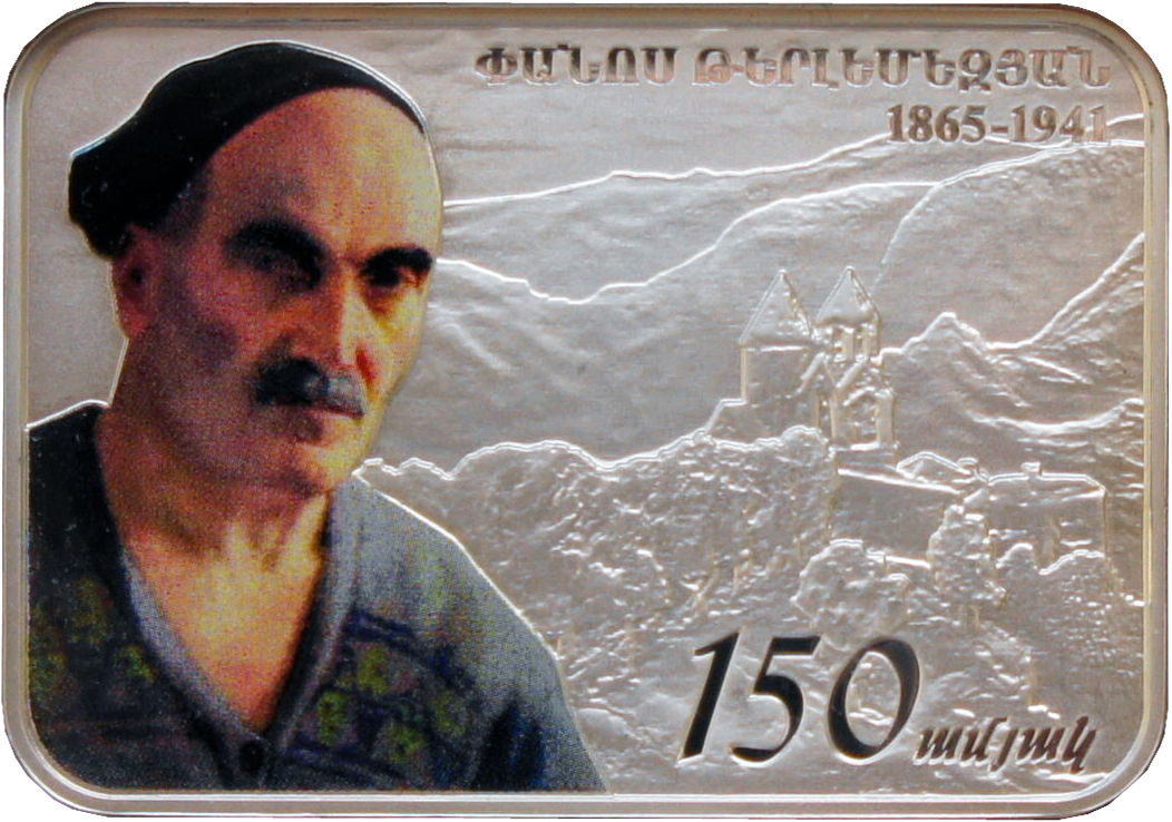 Памятная монета Армении 2015 года "Фанос Терлемезян" - 100 драм - серебро 925